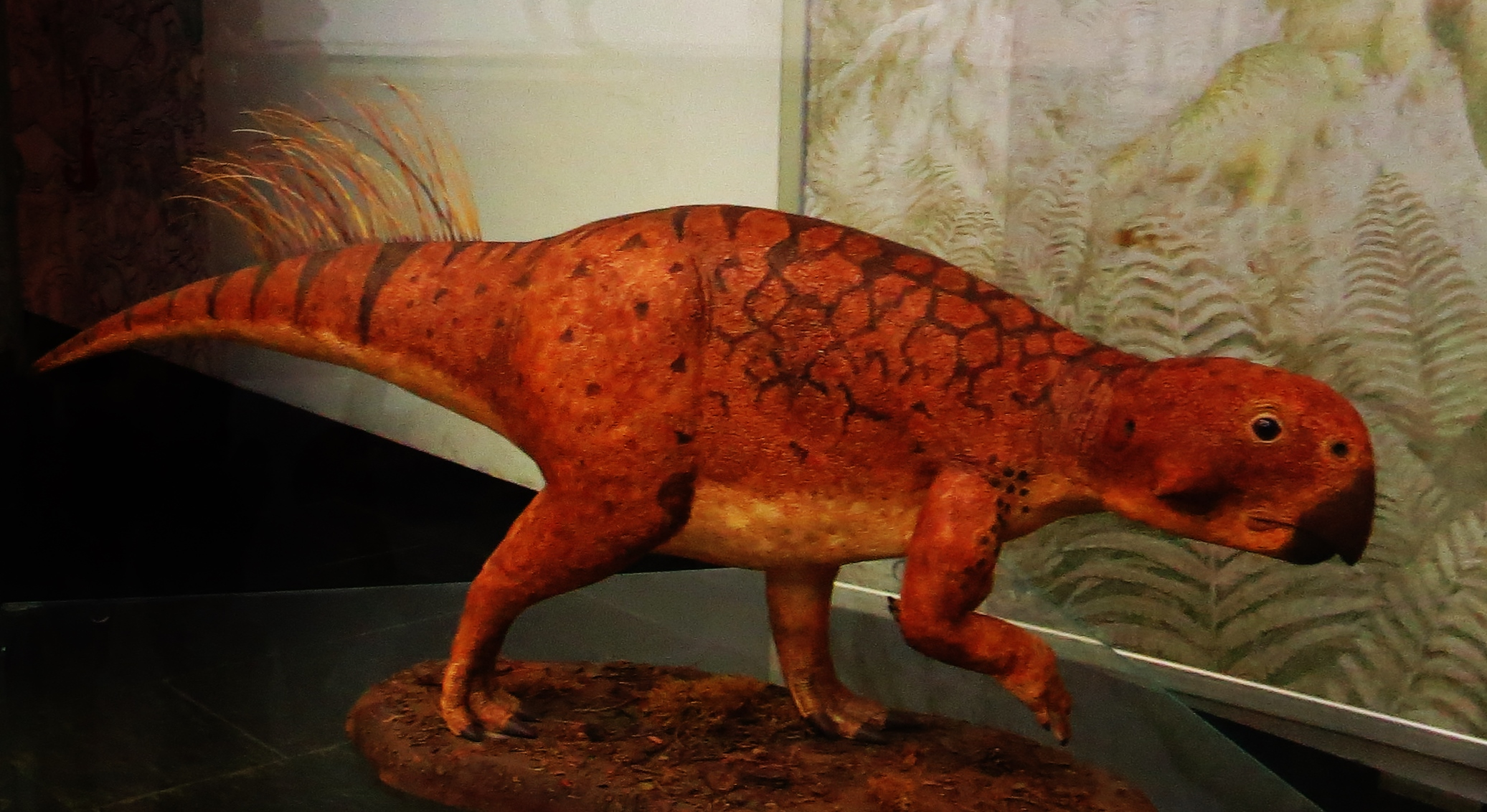 Fossil - Took the picture at Natural History Museum, Karlsruhe